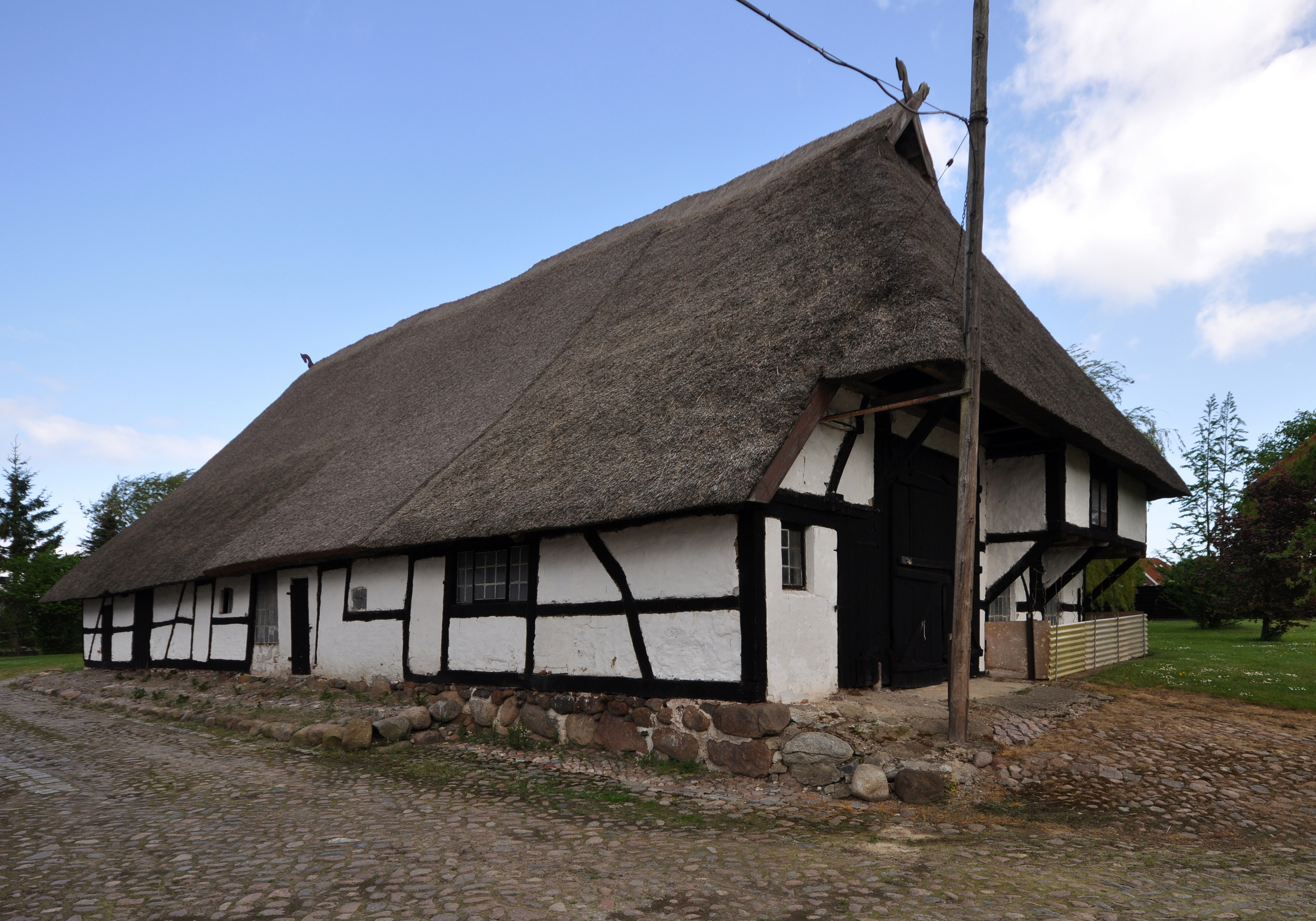 Framework barn in Admannshagen